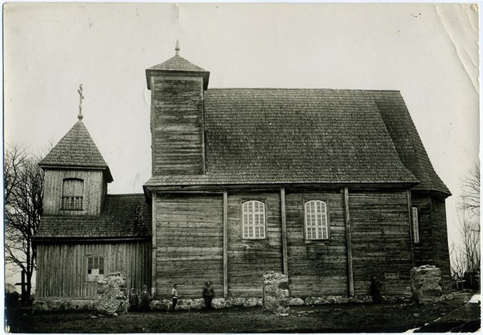 Беларуская (тарашкевіца): Іжа (Iža). Царква